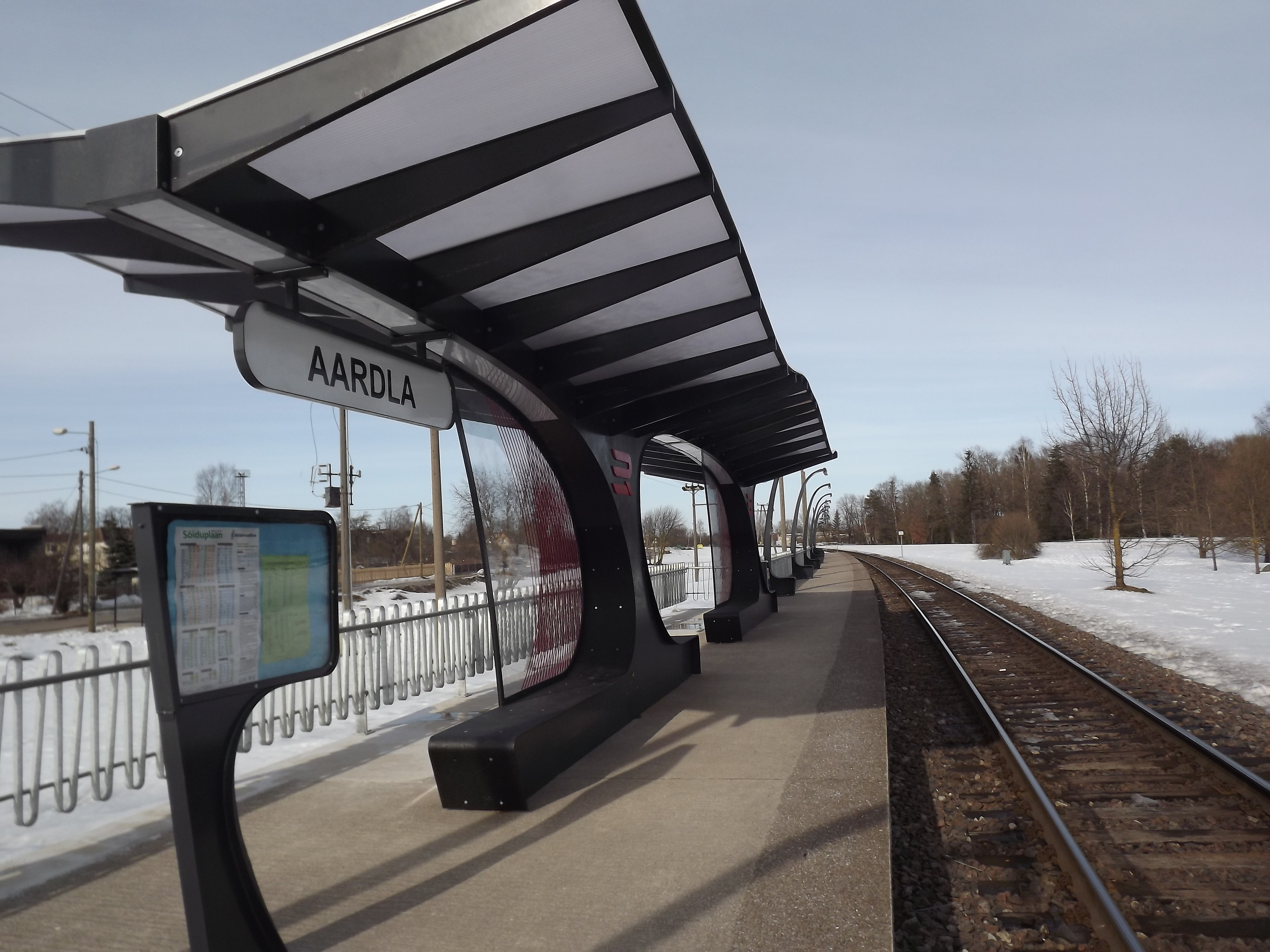 Aardla raudteepeatus vaatega Tartu poole